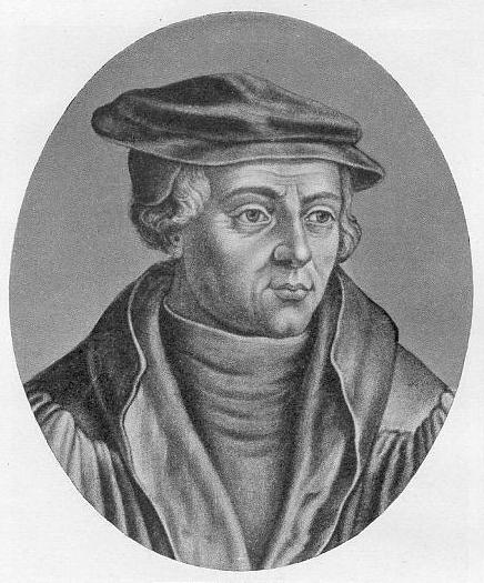 Beatus Rhenanus (1485–1547), deutscher Humanist. Stich von Johann Jacob Haid.